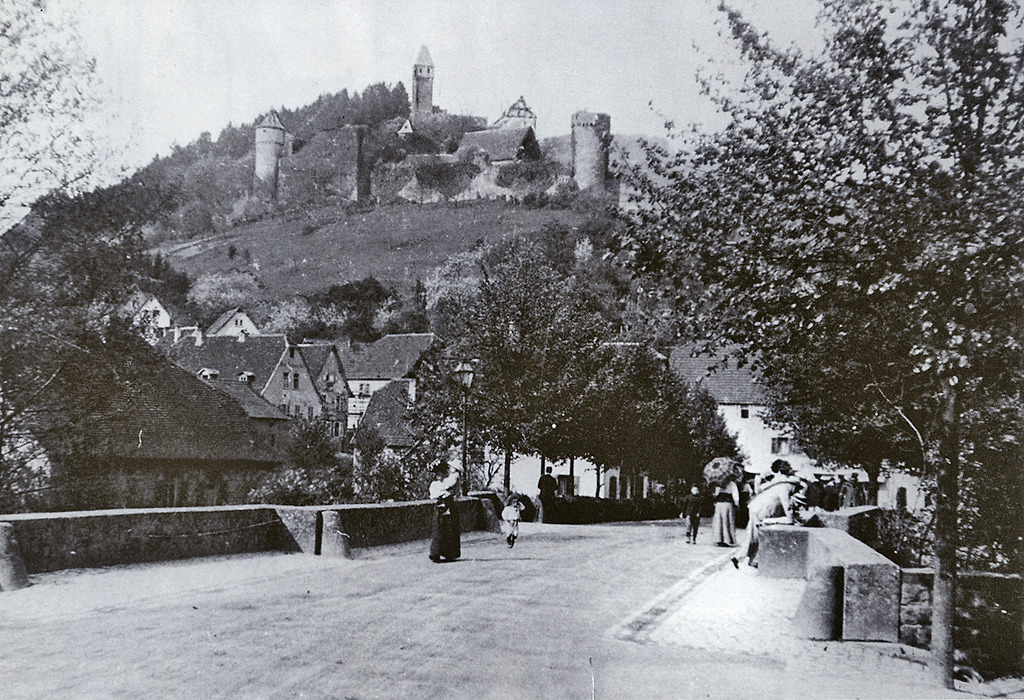 Steinerne Brücke in Hirschhorn, um 1900. Birkenallee mit Steinerner Brücke - Blick zum Freien Platz und Schloß um die Jahrhundertwende